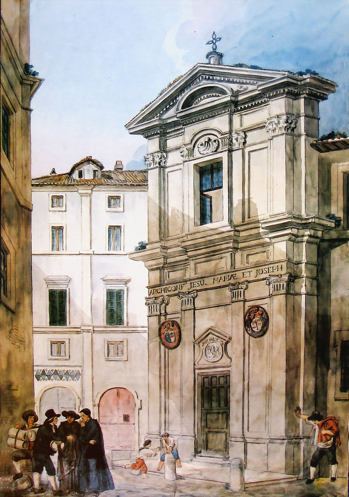 Chiesa distrutta di San Nicola in Arcione